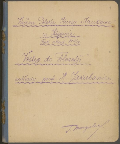 Notatki opublikowane stworzone w 1917-1918 roku, przez Ludwika Janowskiego (1878 - 1921), z wykładów Henryka Jakubanisa (1879 - 1949), z wykładu Wstęp do Filozofii